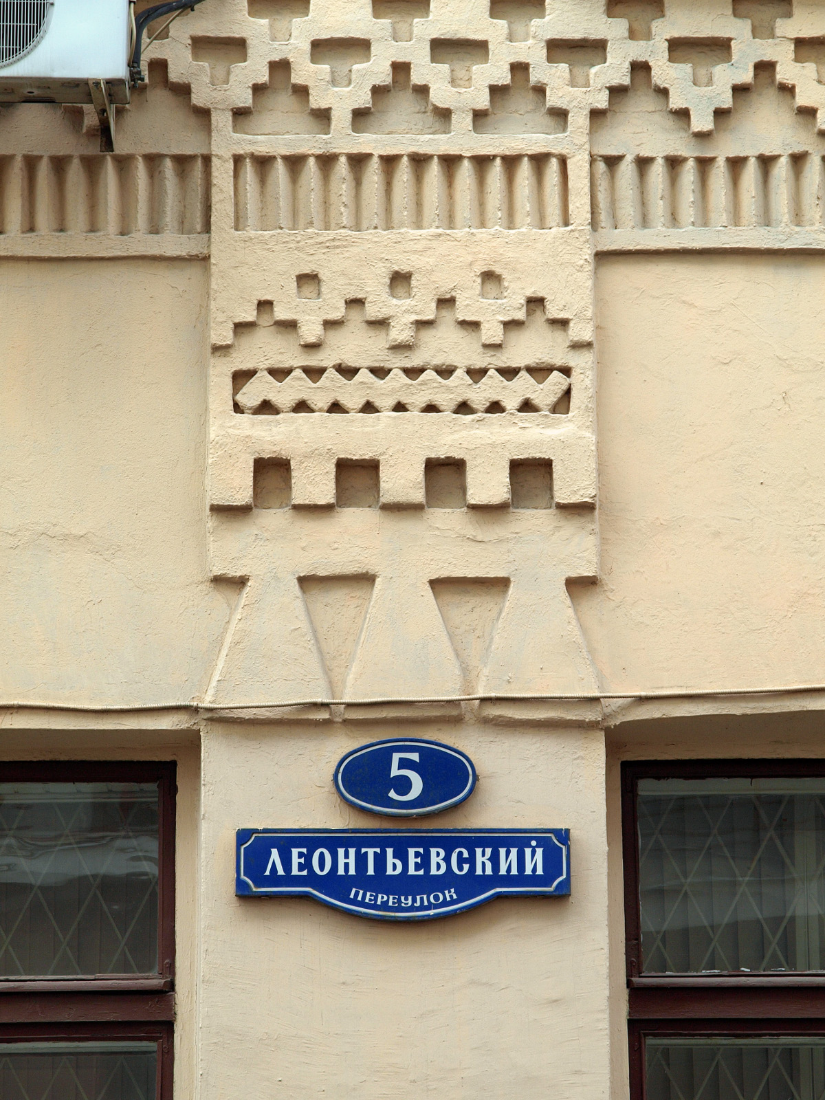 Леонтьевский переулок, Москва.